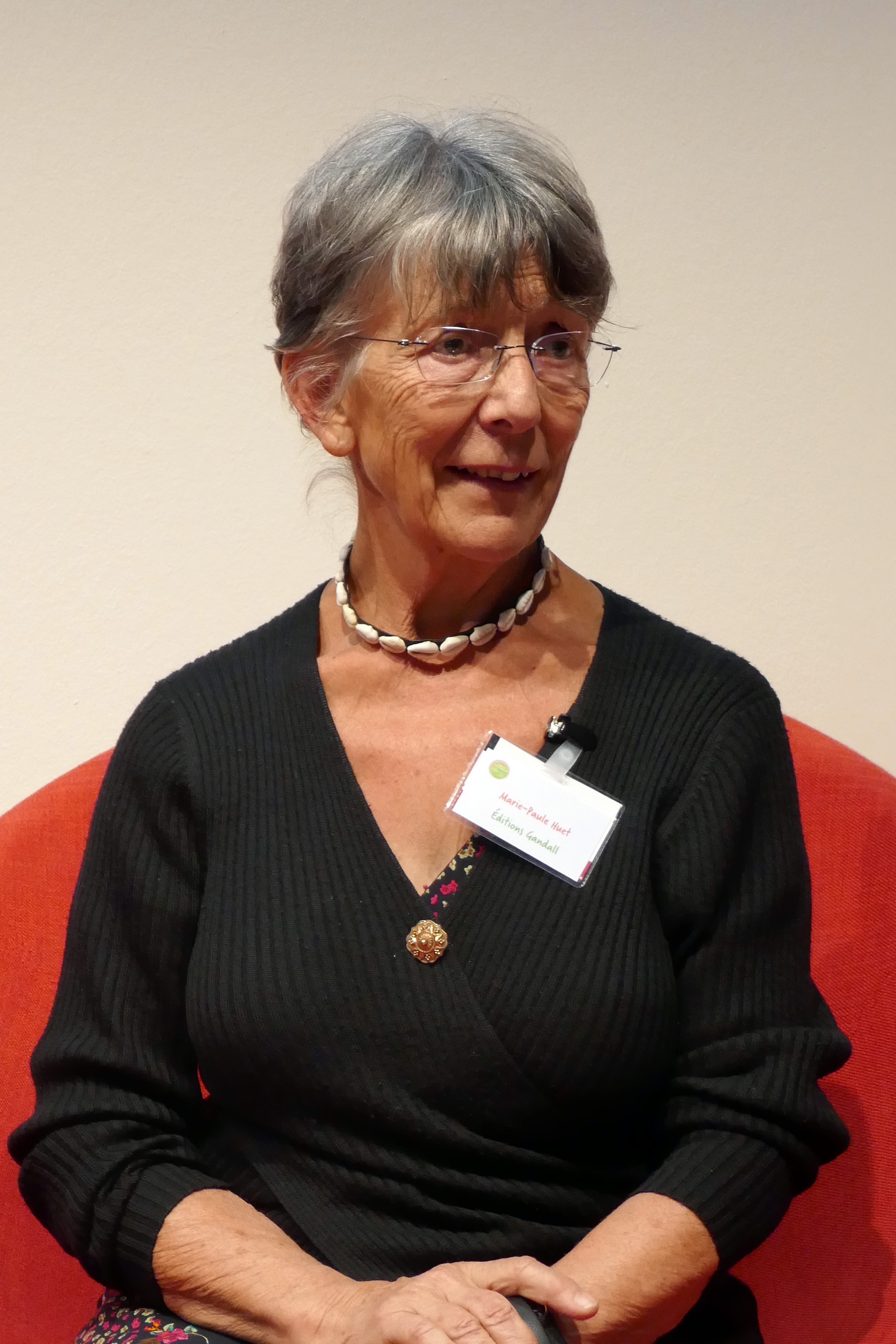 Marie-Paule Huet, directrice littéraire des éitions Ganndal (Guinée), lors de la table-ronde Publizieren in Afrika / Publishing in Africa, à la Foire du livre de Francfort 2017.